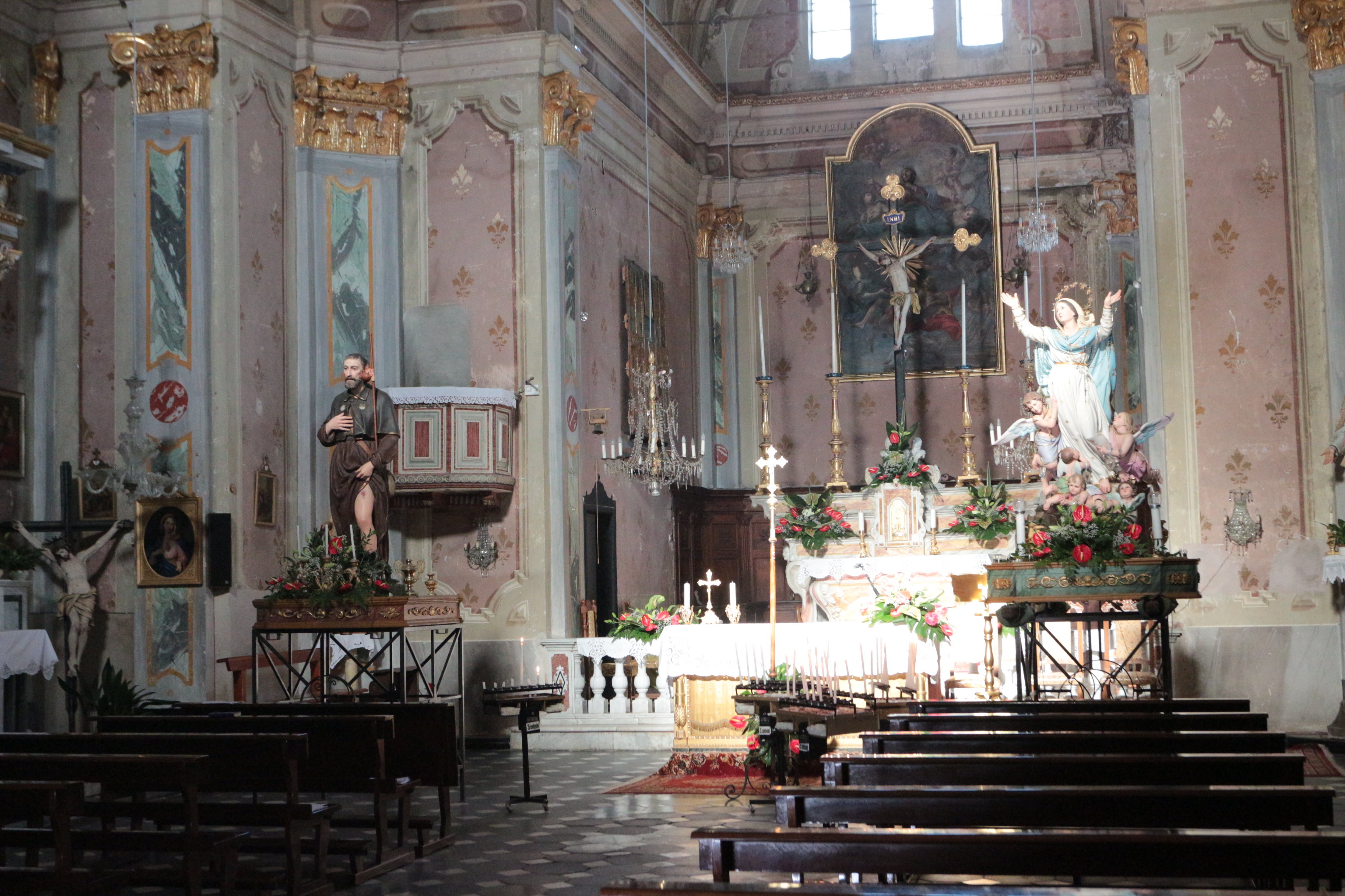 Chiesa a croce latina a 3 navate; nella foto Navata centrale e altare maggiore; a sx la statua di S. Rocco e a dx statua della Madonna Assunta.